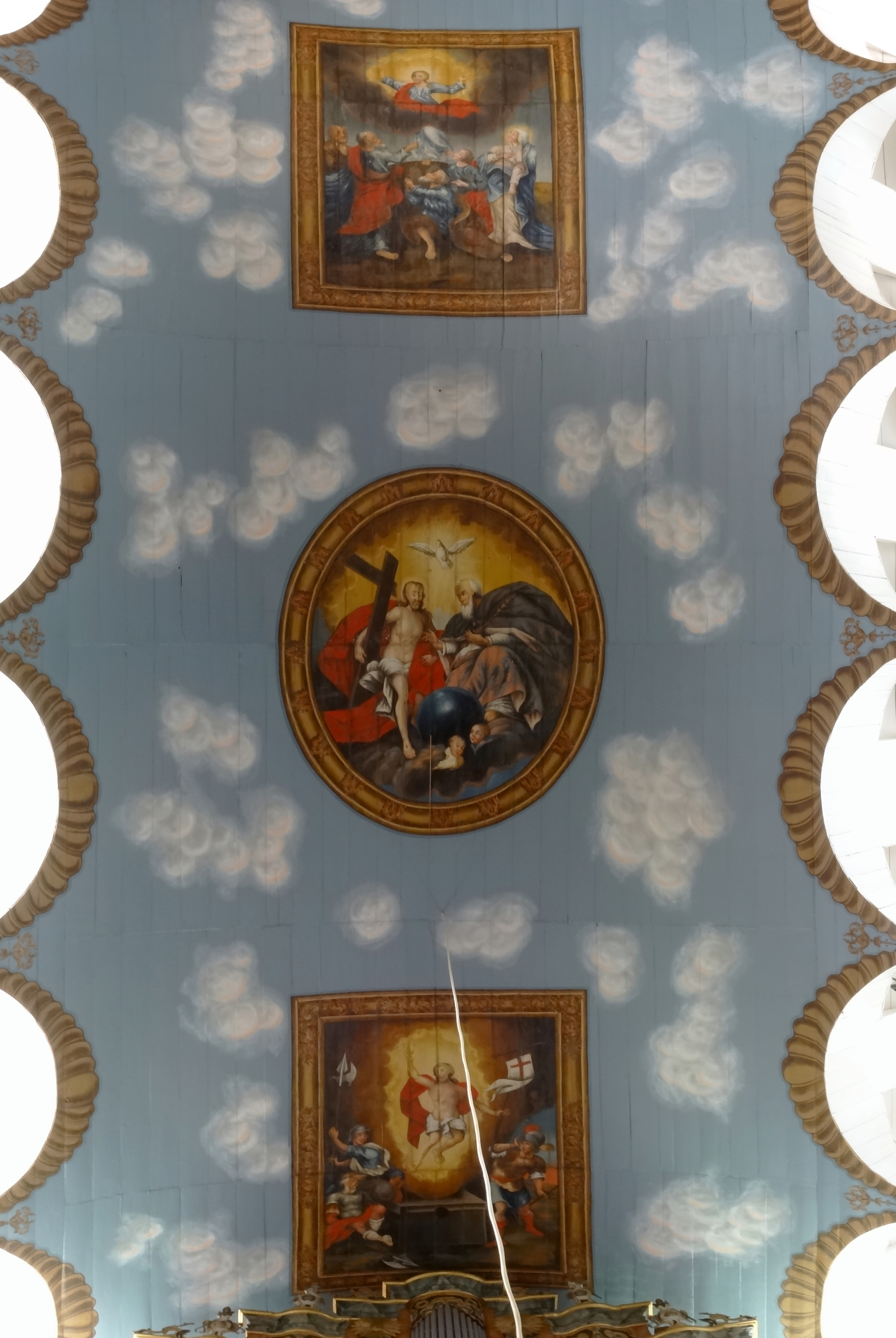 Dom der Rhön, die Deckengemälde von Johann Jacob Gehres zeigen die Heilige Dreifaltigkeit, Christi Auferstehung und seine Himmelfahrt.